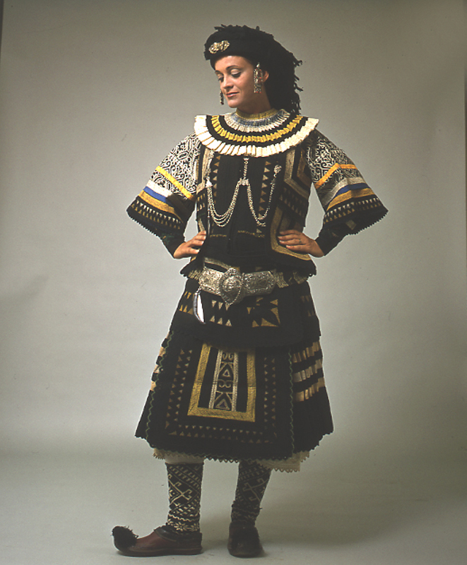 Φορεσιά Σαρακατσάνας γνωστή ως "Πολίτικη". Συλλογή Πελοποννησιακού Λαογραφικού Ιδρύματος, Ναύπλιο